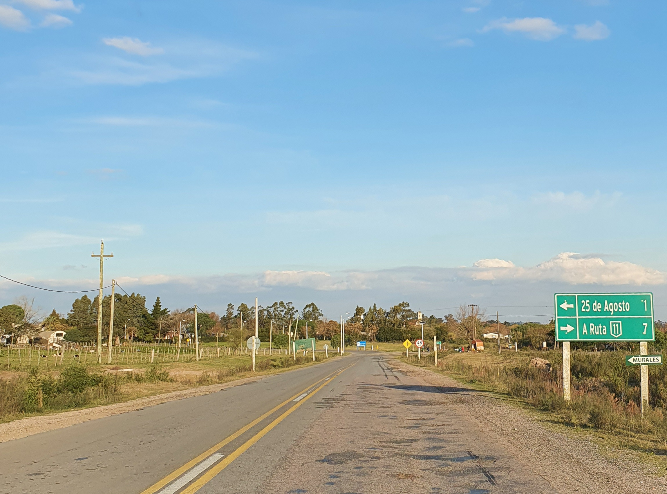 Ruta 77, próximo a 25 de Agosto, Florida, Uruguay.